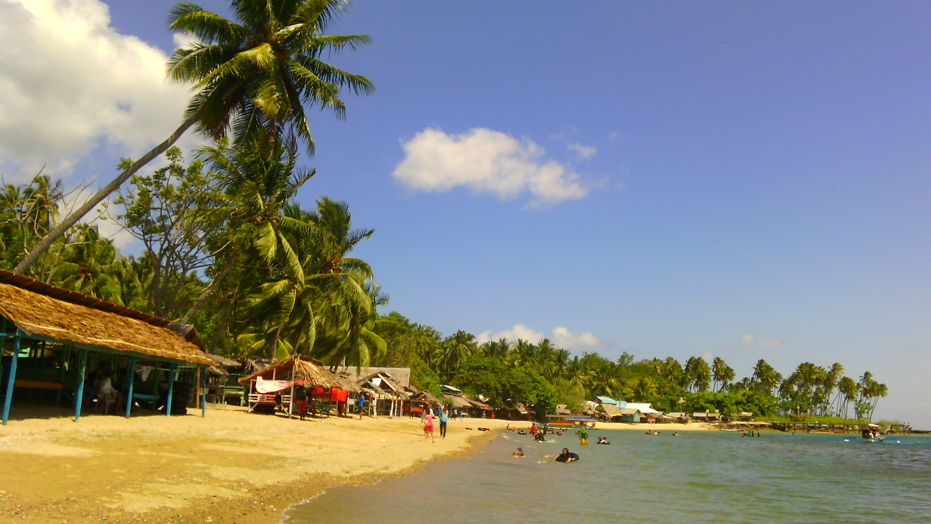 Pantai Botutonuo, Bone Bolango, Gorontalo.